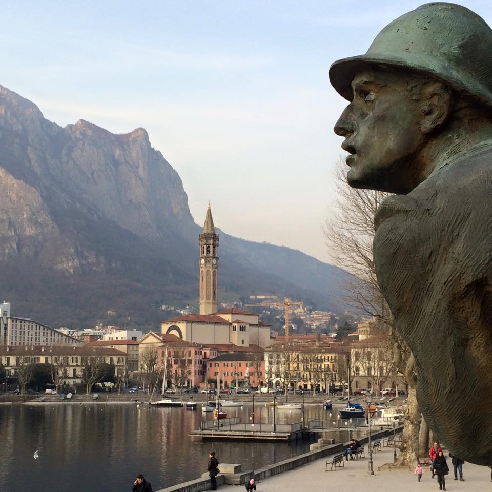 Particolare del monumento ai caduti sul lungolago